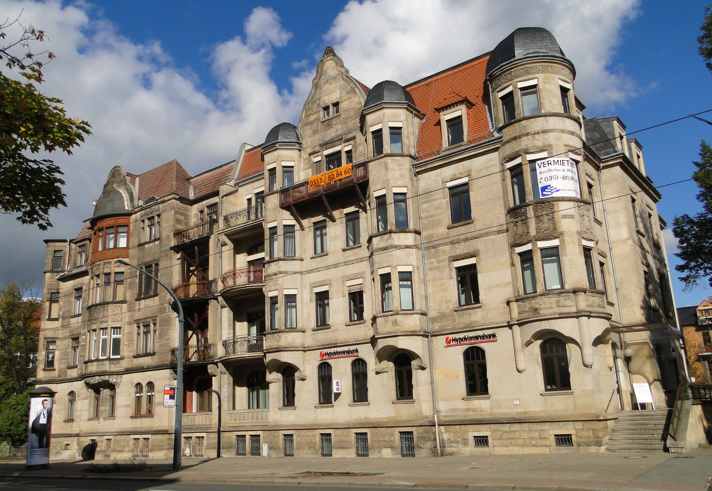 Doppelhaus Nürnberger Straße 47/Hübnerstraße 15 in Dresden mit Elementen des Jugendstils